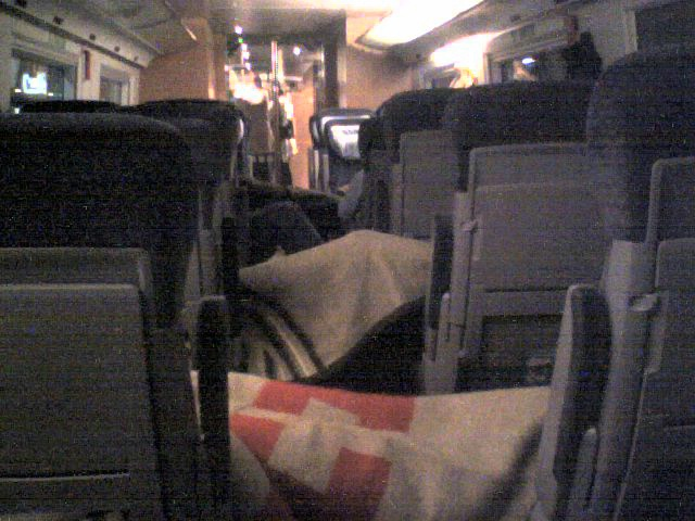 Aufgenommen im Zug (Würzburg Hbf) während des ersten Ausfalls des gesamten Fernverkehrs der Deutschen Bahn in Deutschland durch das Sturmtief Kyrill. Es wurden Kissen, Decken und Getränke verteilt. Die Leute schlafen im Zug, da kein Zug mehr den Bahnhof verlässt und alle Hotels im näheren Umfeld belegt sind. (Selbst am 19.01.2007 um 1:47Uhr mit einem Handy aufgenommen). MatthiasWieland 04:01, 19. Jan. 2007 (CET)